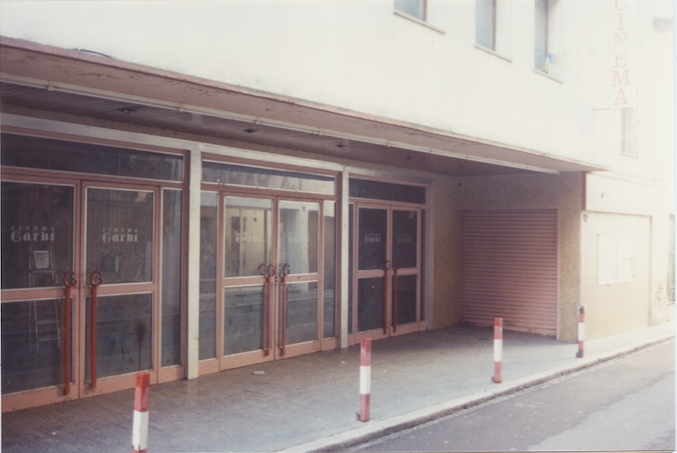 Imatge de la façana del cinema Garbí (fons Martí Pagès)